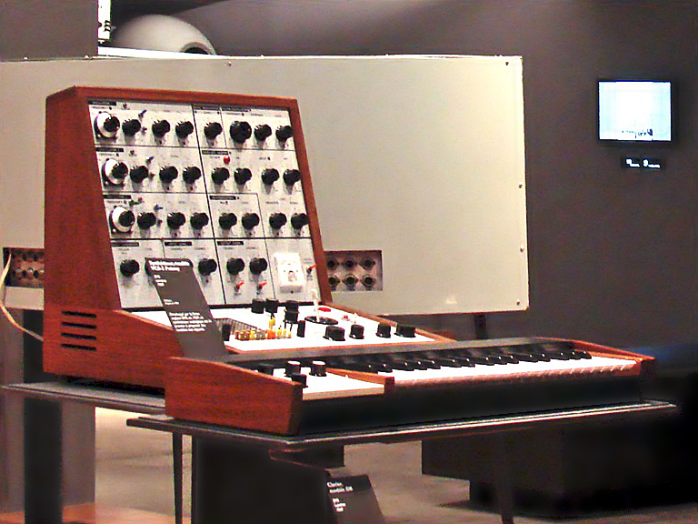 EMS VCS 3 synthesizer (1969, S/N 297) & DK-1 keyboard (1969) References Synthétiseur VCS-3 putney (EMS VCS 3) et clavier pour synthétiseur, E.M.S., Londres, 1969, E.992.8.1 et E.992.11.1. Cité de la musique Paris.